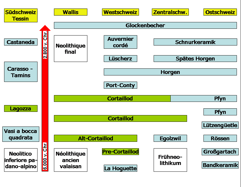 Kulturen der Frühzeit